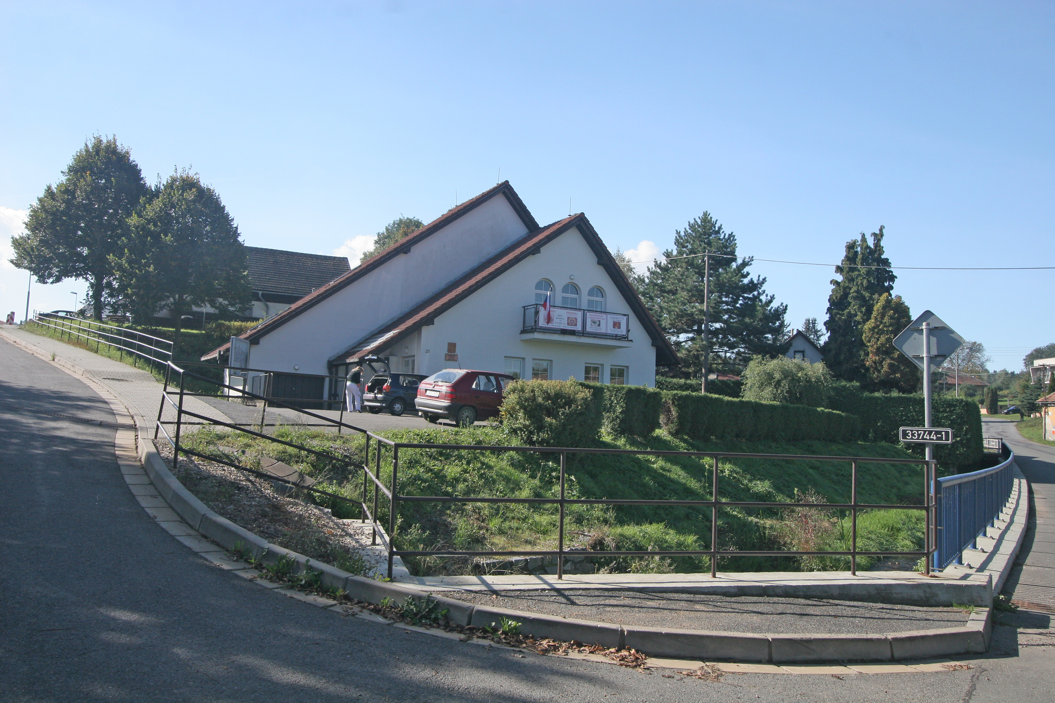 Načešice obecní úřad